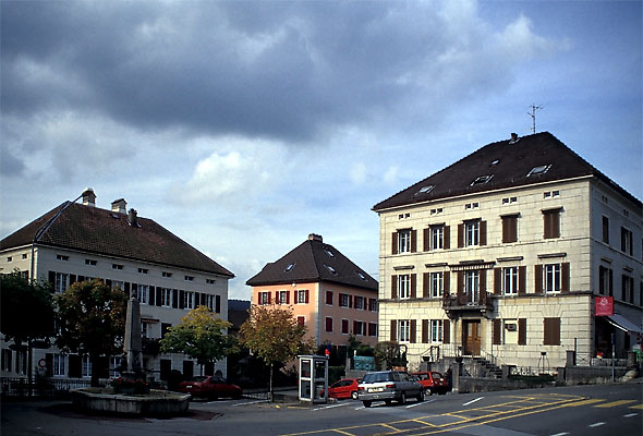 Ortskern von Les Brenets